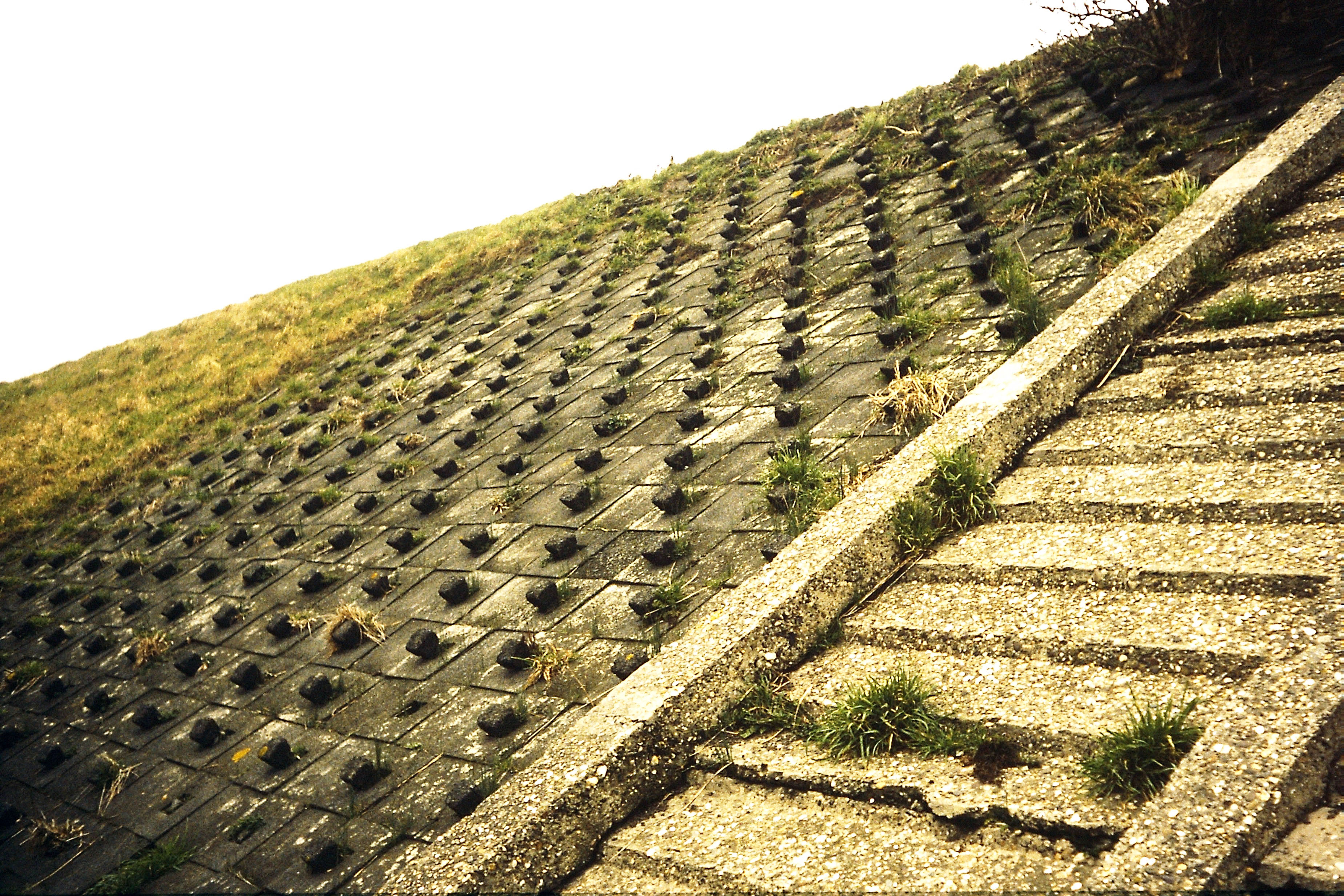 Voorbeeld van een Spijkerglooiing en een Muraltglooiing in Scharendijke, Zeeland. Dit is de binnenzijde van de dijk, de glooiingbekleding zijn hier als museumstukken aangebracht